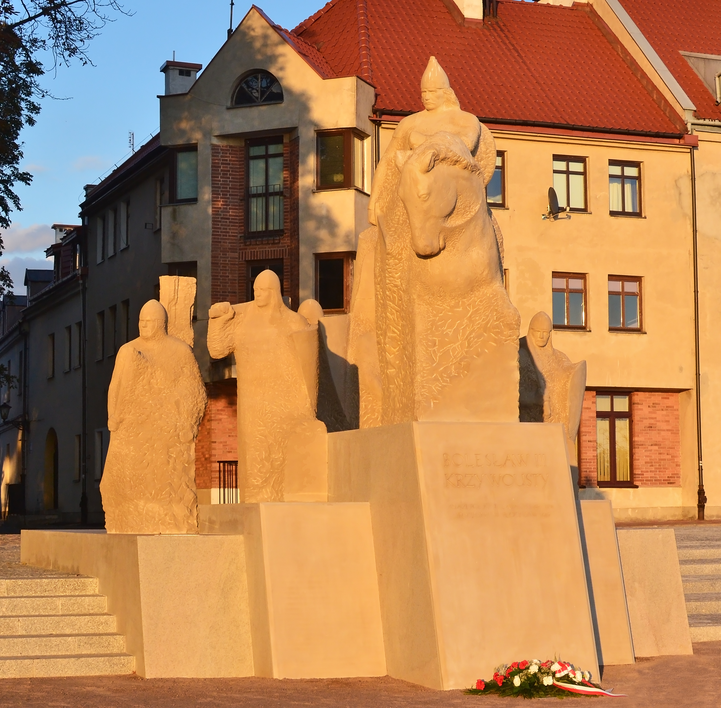 Pomnik Bolesława III Krzywoustego w Płocku – Plac Książęcy na skarpie nadwiślańskiej